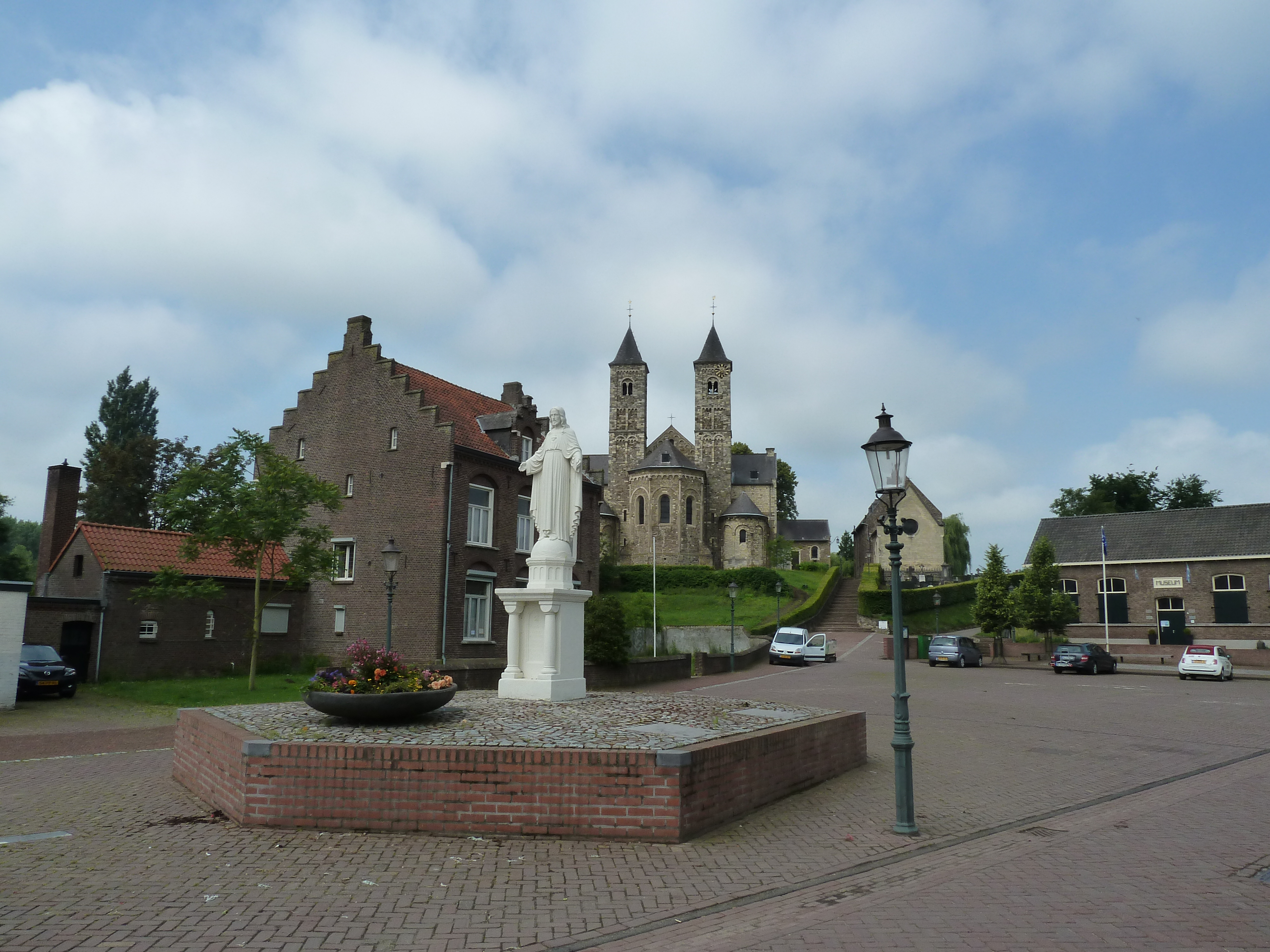 Basiliek van Sint Odiliënberg, Roerdalen, Limburg, Nederland